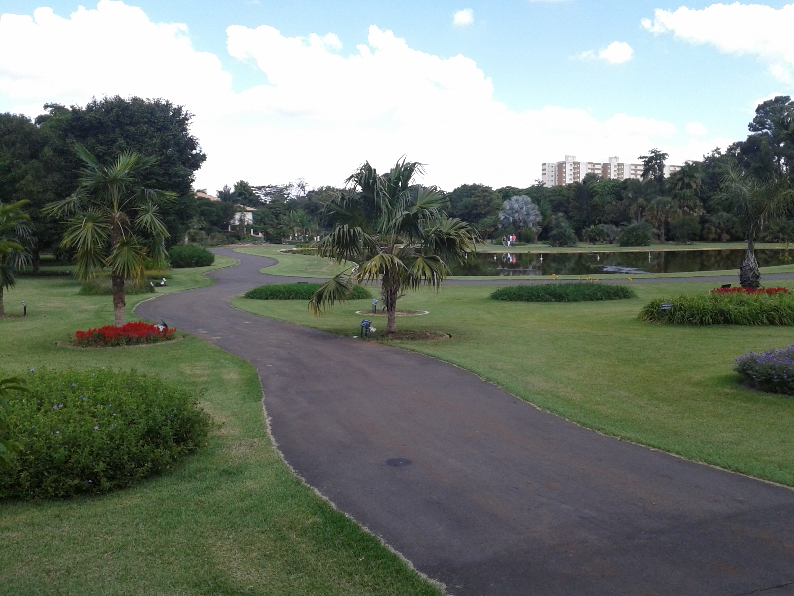 Jardim Botânico do Instituto Plantarum, Nova Odessa, São Paulo.